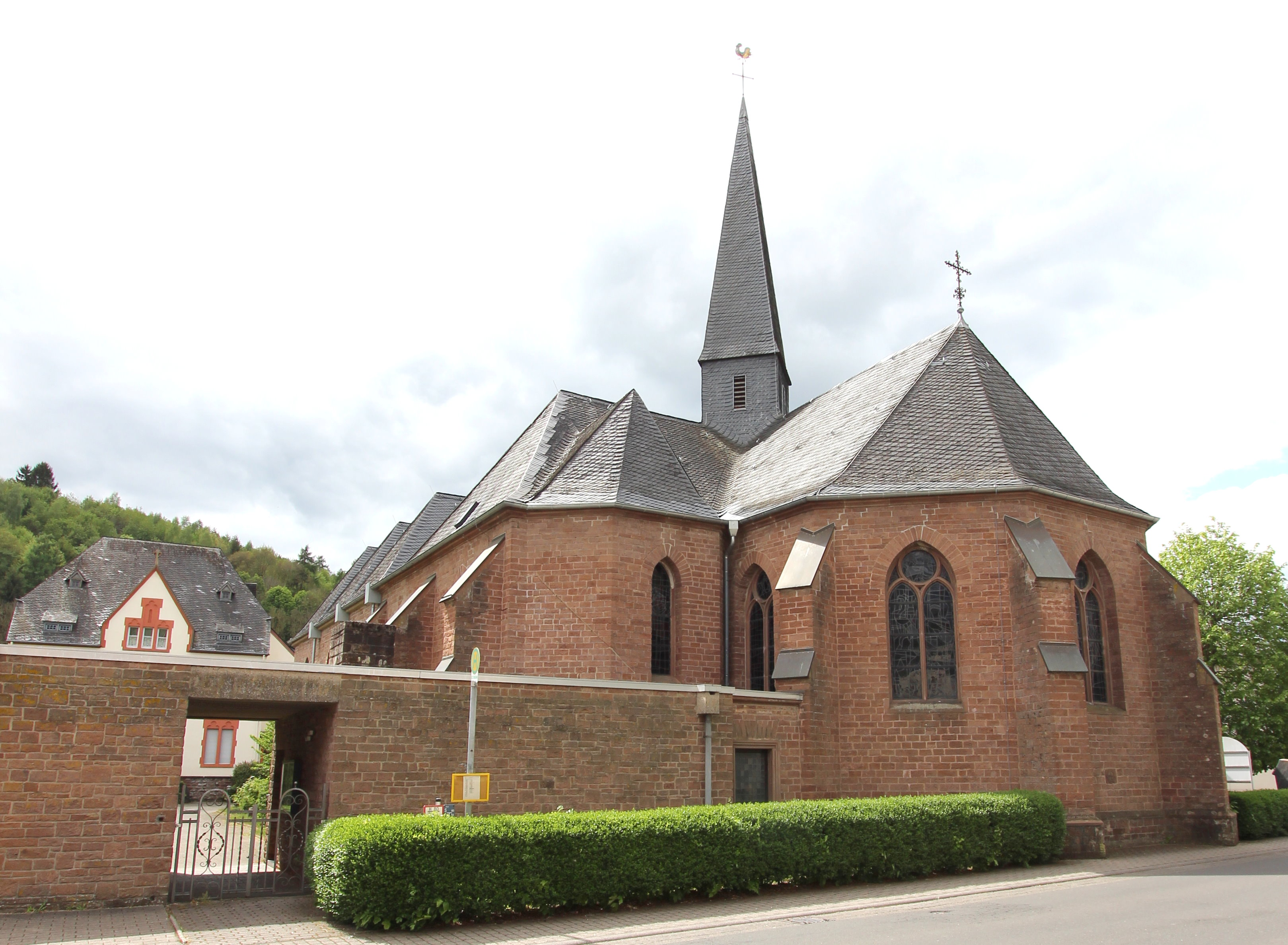 St. Margareta von Antiochia, Im Fronhof 5, 54675 Mettendorf; neugotischer Kleinquadermauerwerksbau; dreischiffige Halle und Chor, 1865, Architekt Dombaumeister Reinhold Wirtz, Trier, Langhaus 1969–71, Architekt Peter Böhr, Trier; mit Ausstattung; auf dem Kirchhof Architekturteile des im Zweiten Weltkrieg zerstörten spätgotischen Langhauses; zwei Pfarrergrabsteine, um 1788 und um 1806, Reste weiterer Grabsteine. Aufnahme der Eingangssituation von 2017.